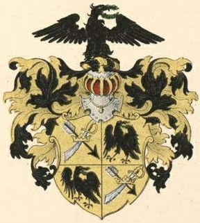 Muravjovi suguvõsa aadlivapp